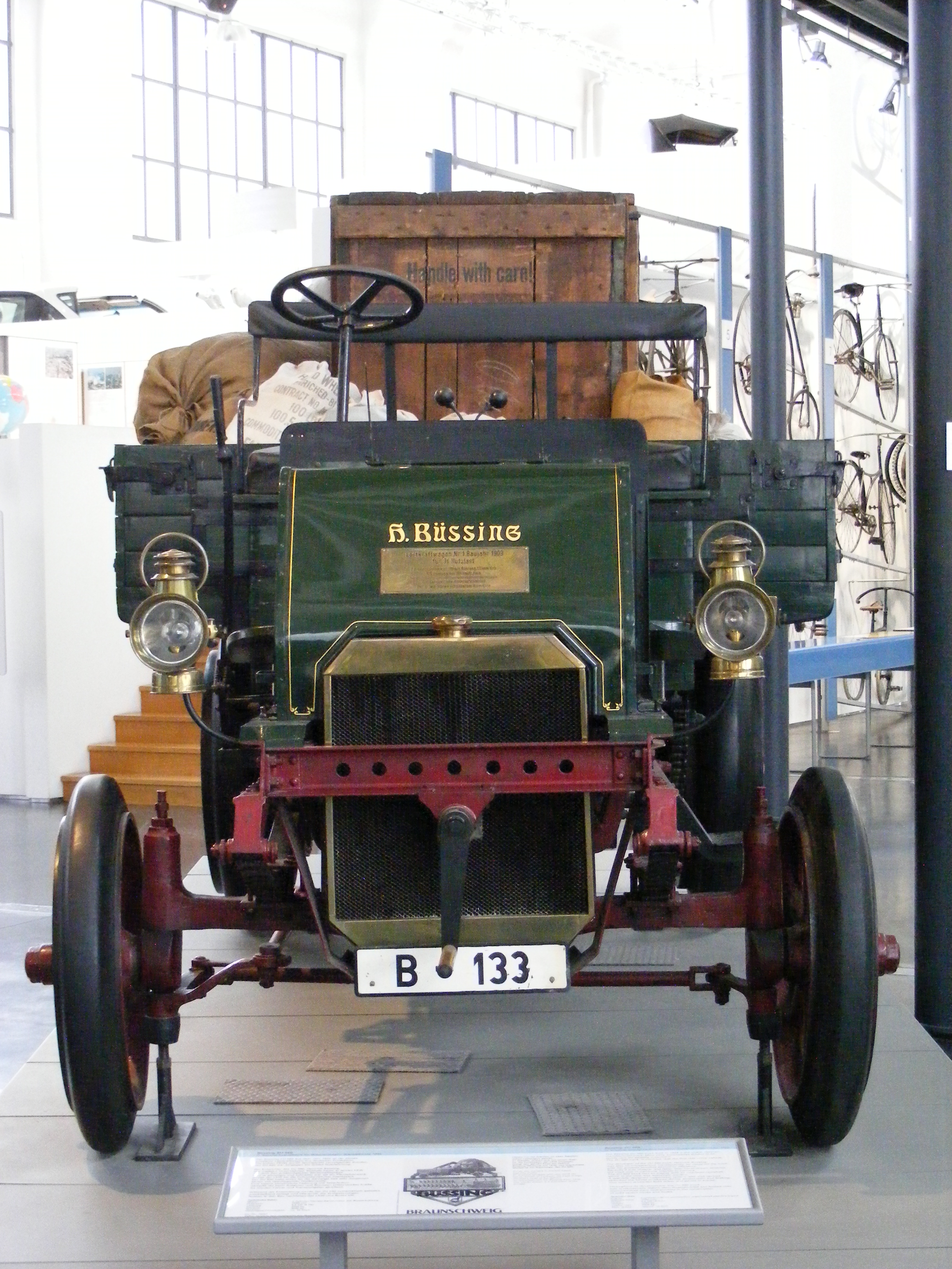 Büssing ZU-550, Bj. 1903 - Front — Exponat im Deutschen Museum Verkehrszentrum München, Halle III